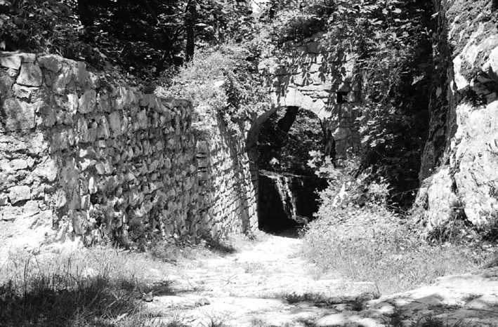 Ruine Waldenburg, Schweiz, aeusseres Tor von innen